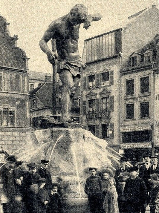 Mülhausen/Mulhouse (Haut-Rhin): Der Arbeiterbrunnen in Mülhausen, Elsass, vom Bildhauer Friedrich Beer, 1906